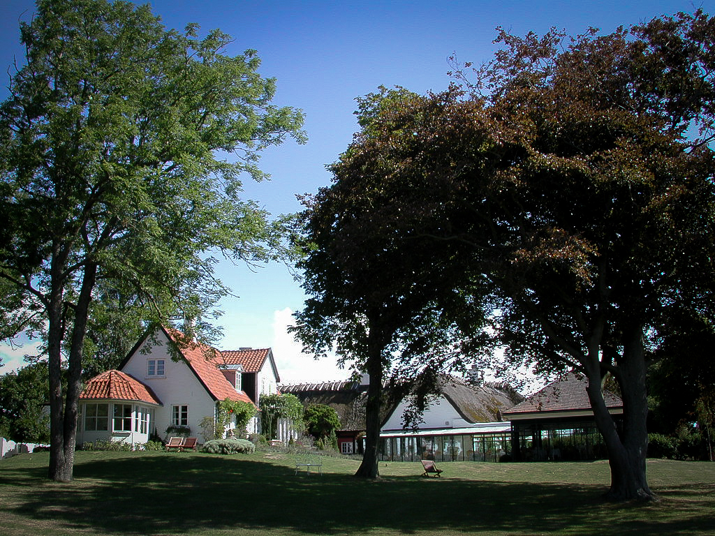 Falsled Kro, Fyn, Denmark